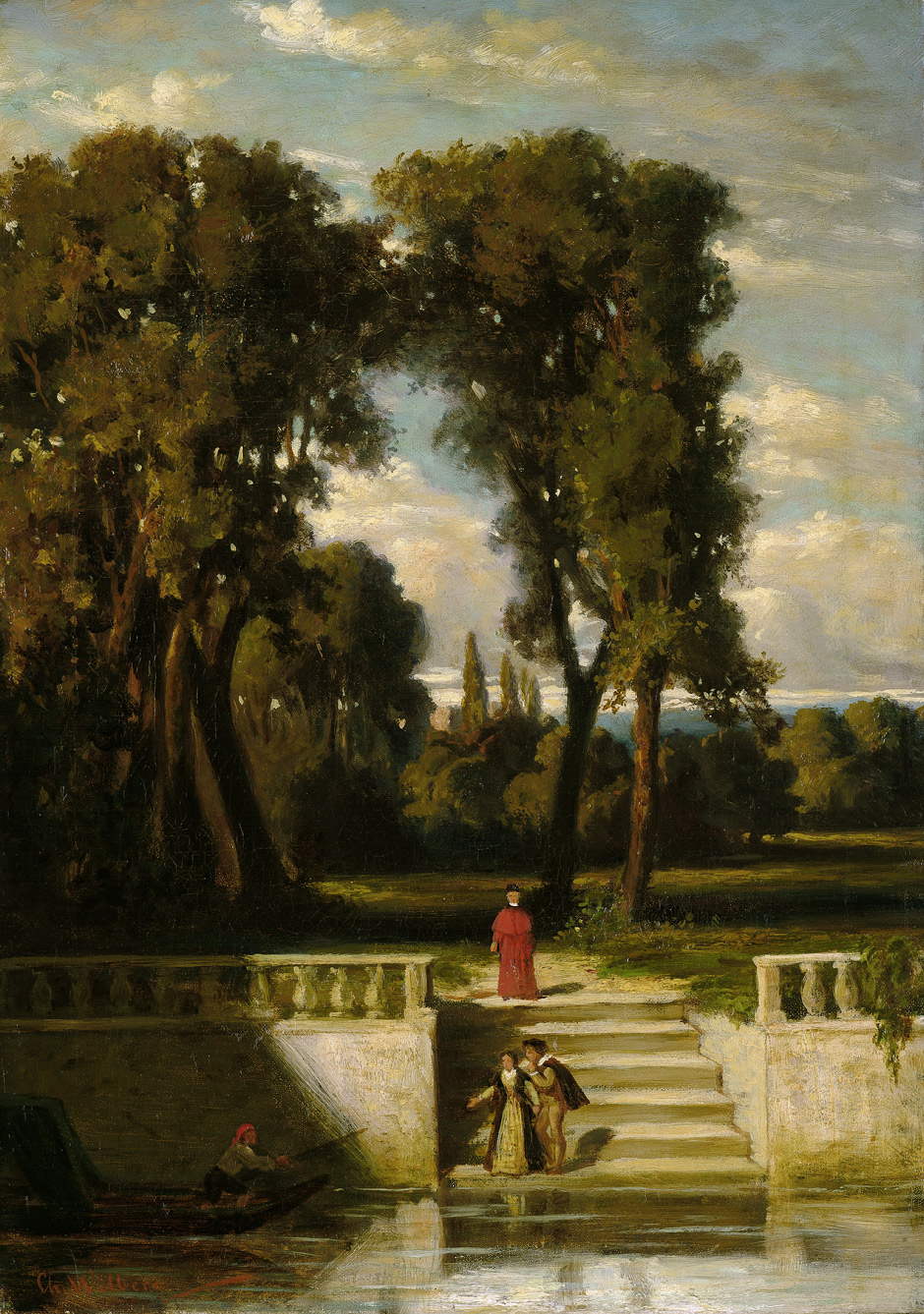 Christian Wilberg: Abendstimmung im Park einer italienischen Villa. Öl auf Leinwand. 54 x 39 cm. Links unten signiert. Um 1880.